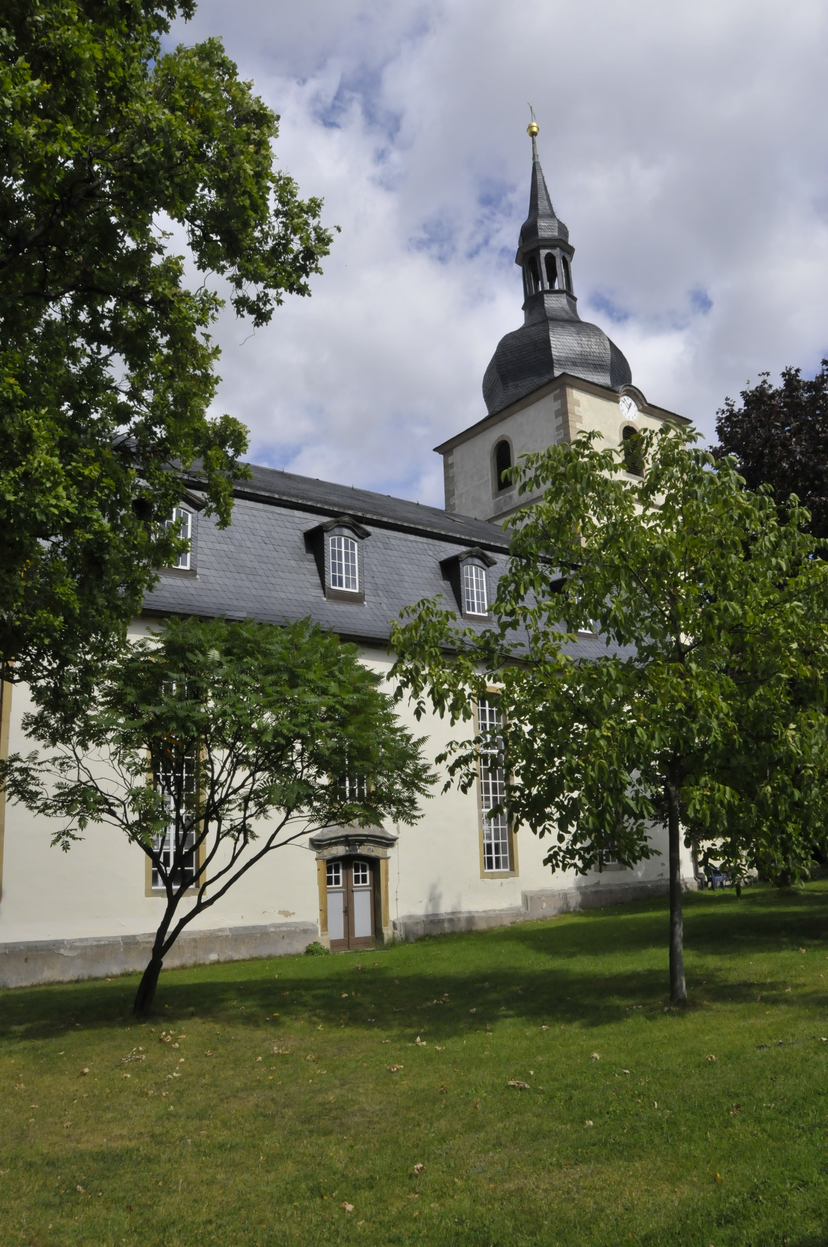 Crawinkel, Kirche